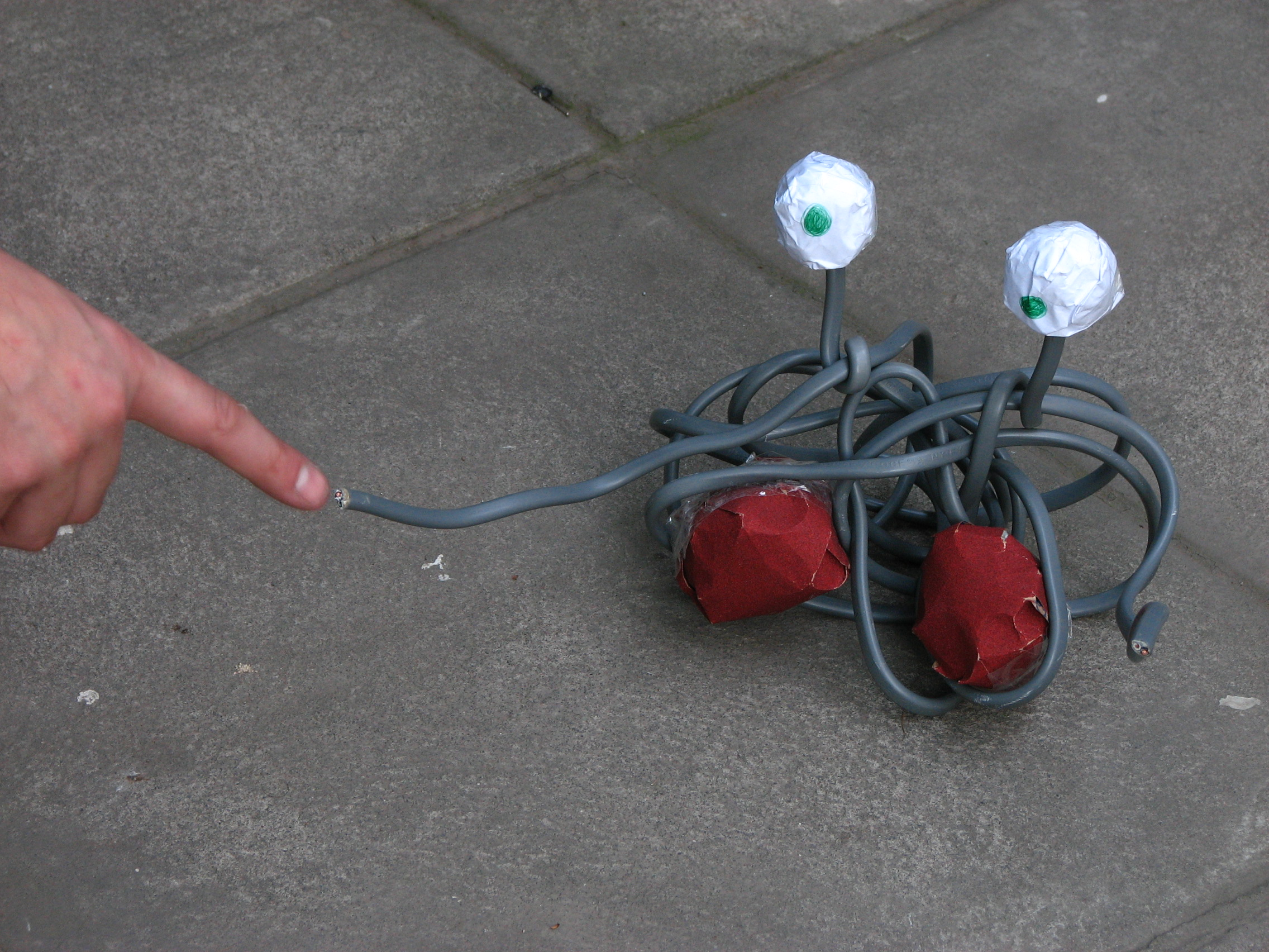 he visto la luz.......